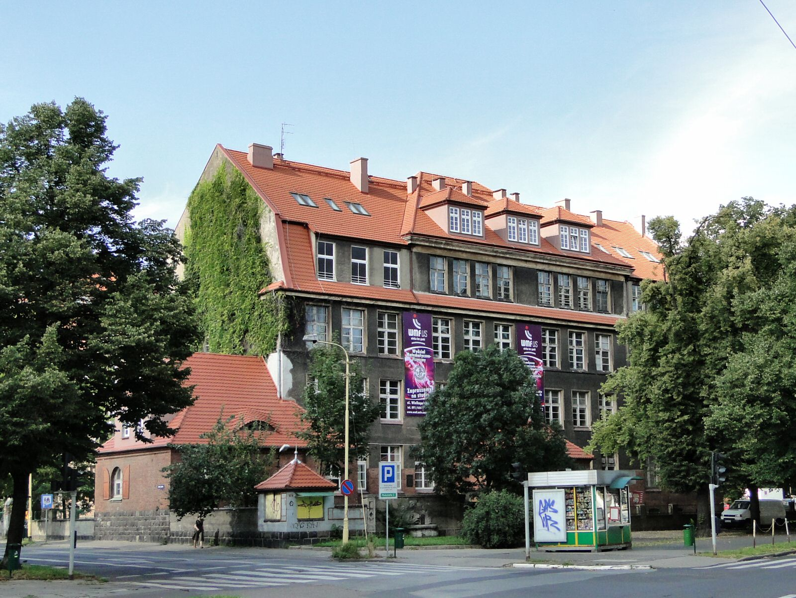 Siedziba Wydziału Matematyczno-Fizycznego Uniwersytetu Szczecińskiego przy ulicy Wielkopolskiej 15 w Szczecinie.